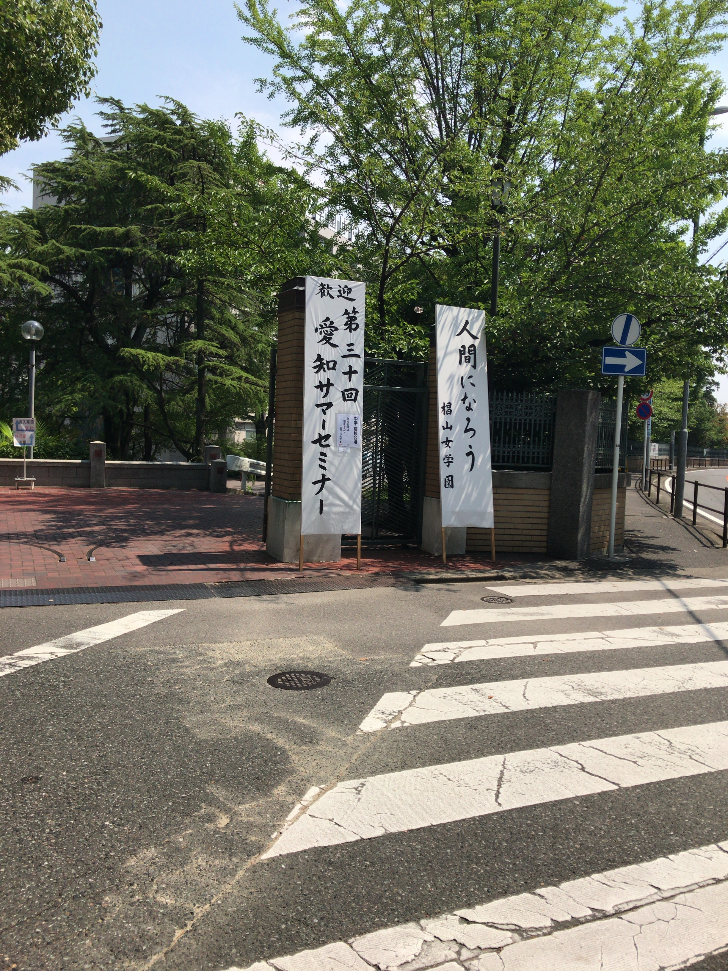 2018年の愛知サマーセミナーの入り口の様子です。